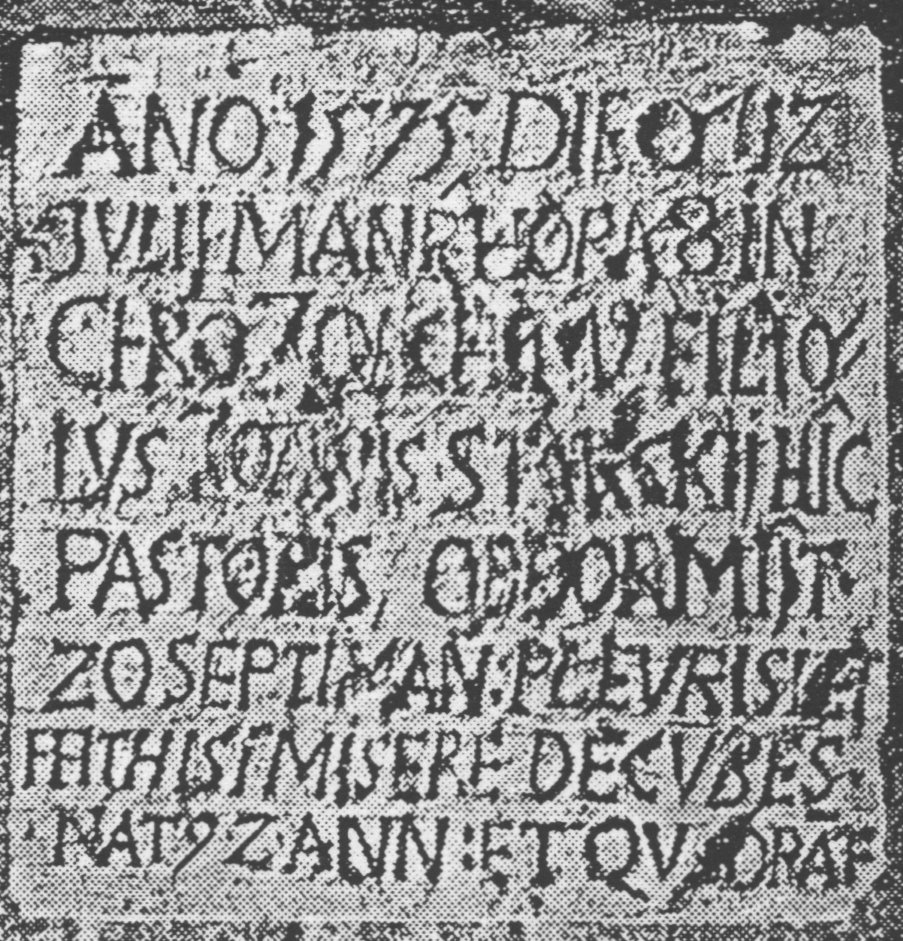 Fotografie eines Ziegeltongrabsteins aus dem 16. Jahrhundert an der Sankt-Stephanus-Kirche in Magdeburg Westerhüsen